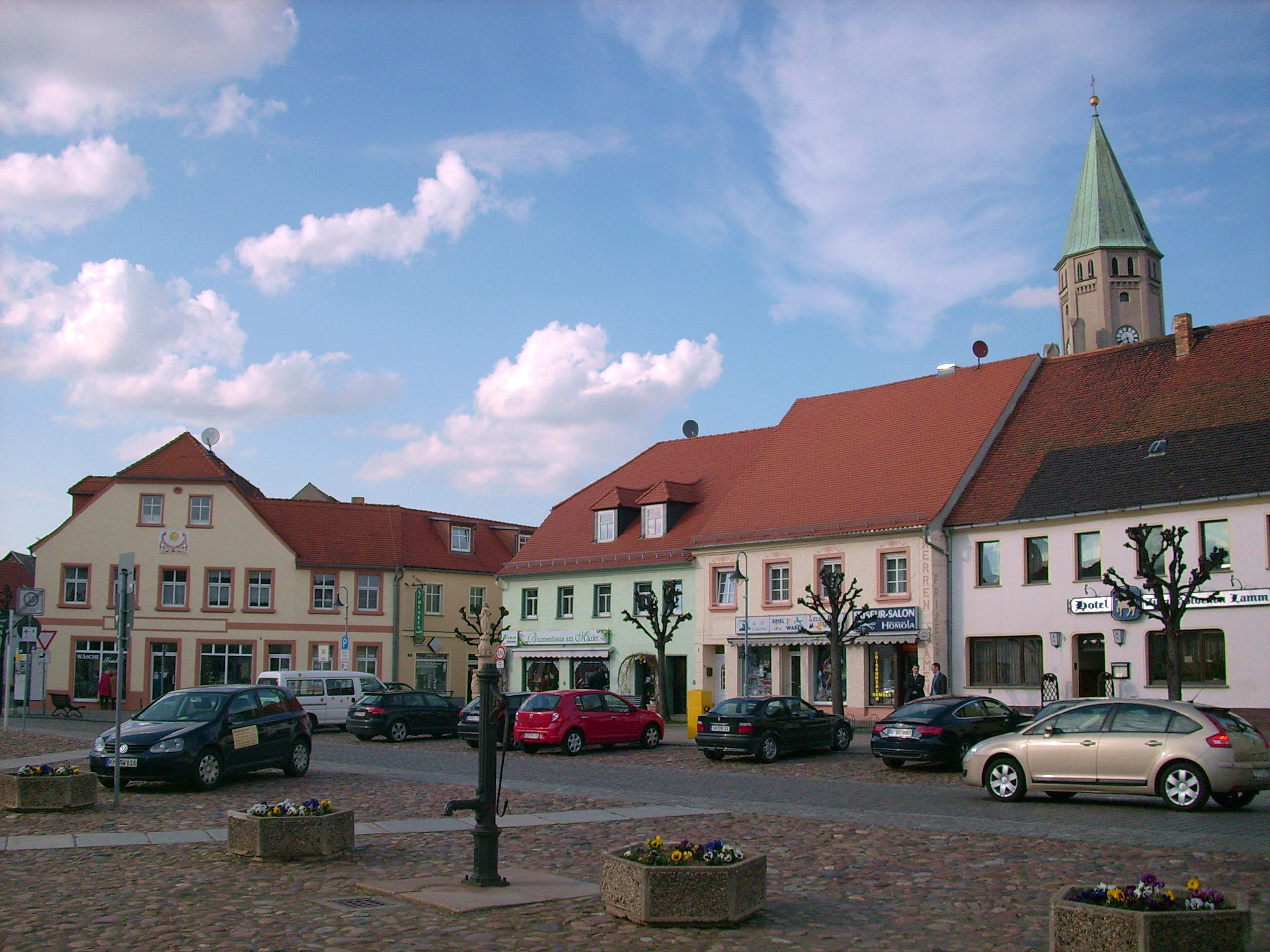 Marktplatz in Wittichenau